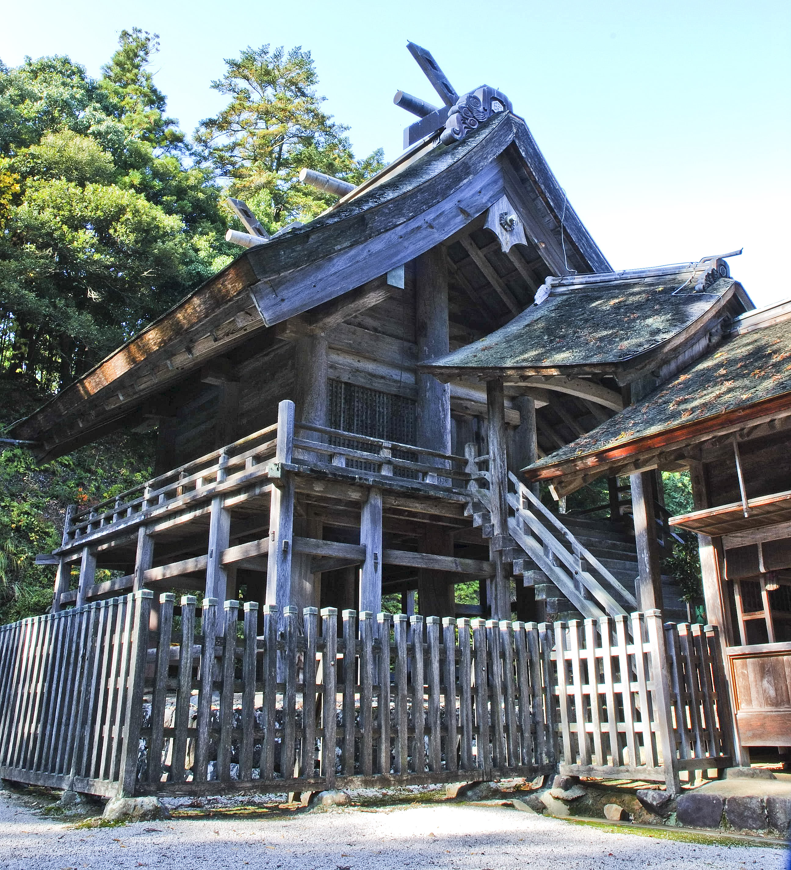 Kamosu jinja